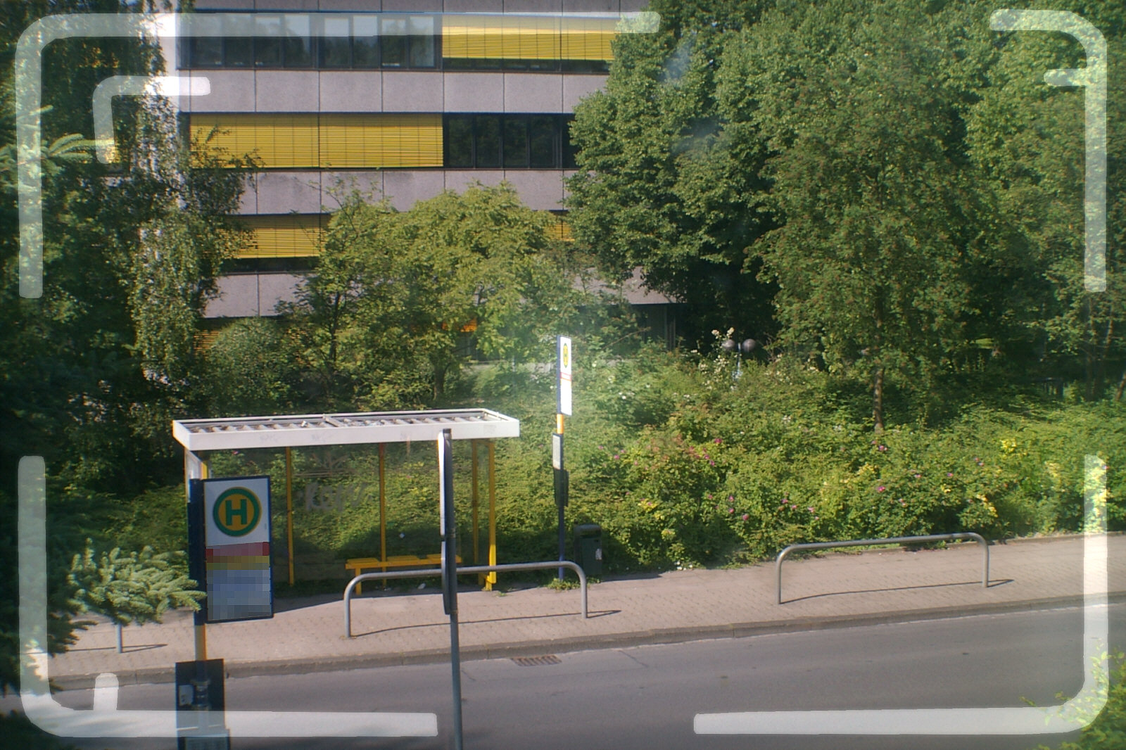 Leuchtrahmensucher einer Agfa Optima 1535 mit Parallaxenmarkierungen für Aufnahmen im Nahbereich. Der helle Bereich in Bildmitte ist das Meßfeld des eingebauten Mischbildentfernungsmessers. Aufnahme mit Ricoh Caplio GX